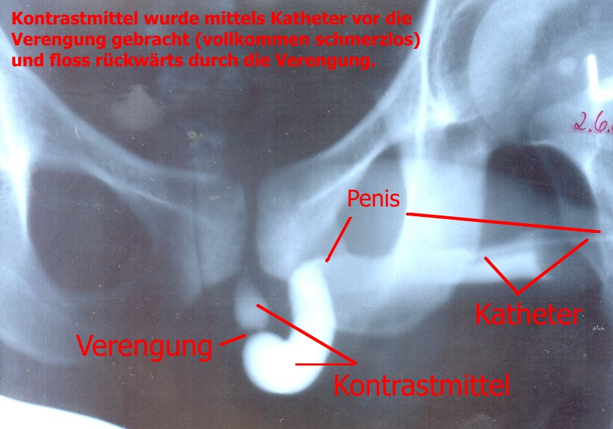 urethra stricture by men / Harnröhrenverengung beim Mann